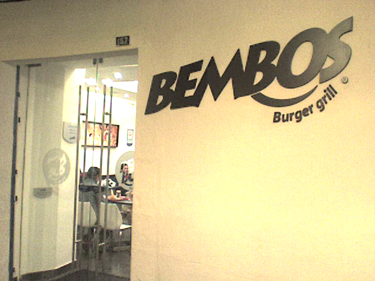 Local de Bembos en la Plaza de Armas de Cusco